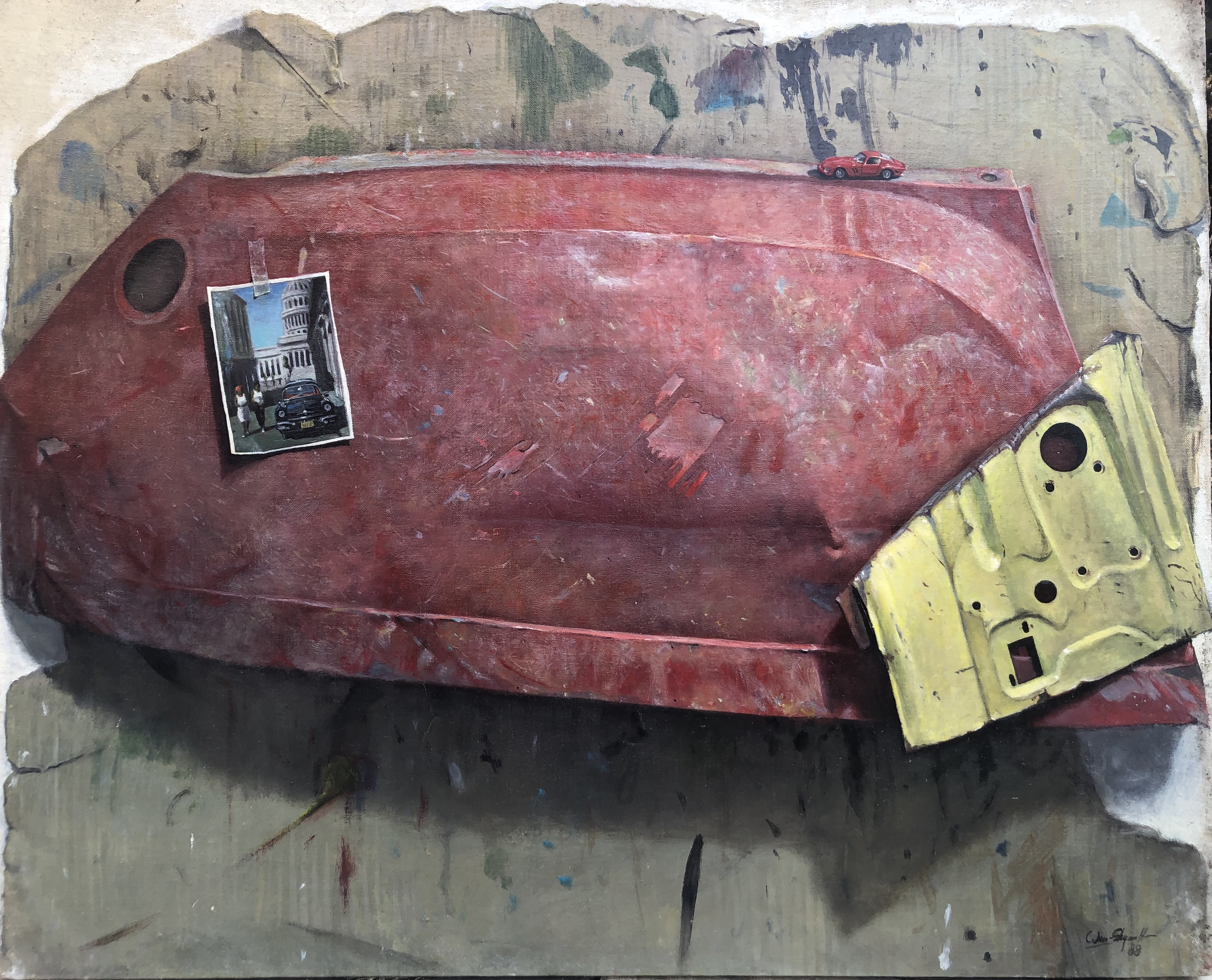 Chapas, Óleo sobre lienzo, 81x100cm,1988, Obra de primer etapa de Santos Hu